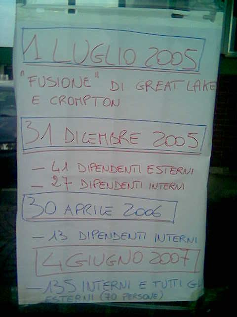 Manifesto affisso ai cancelli durante il presidio. Foto di Paginazero